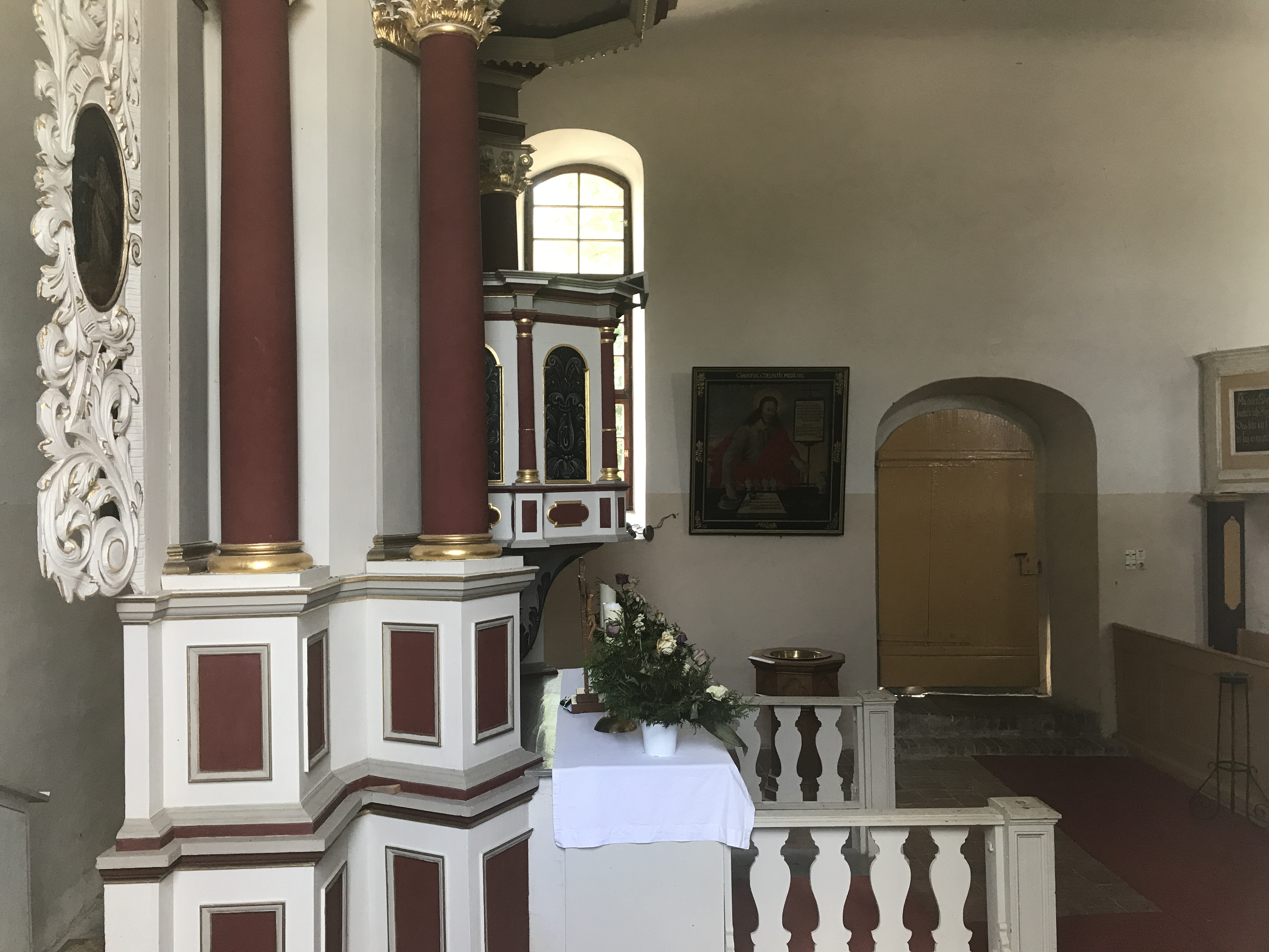 Die Dorfkirche Plötzin ist eine im Kern romanische Feldsteinkirche aus dem 13. Jahrhundert in Werder (Havel) im Land Brandenburg